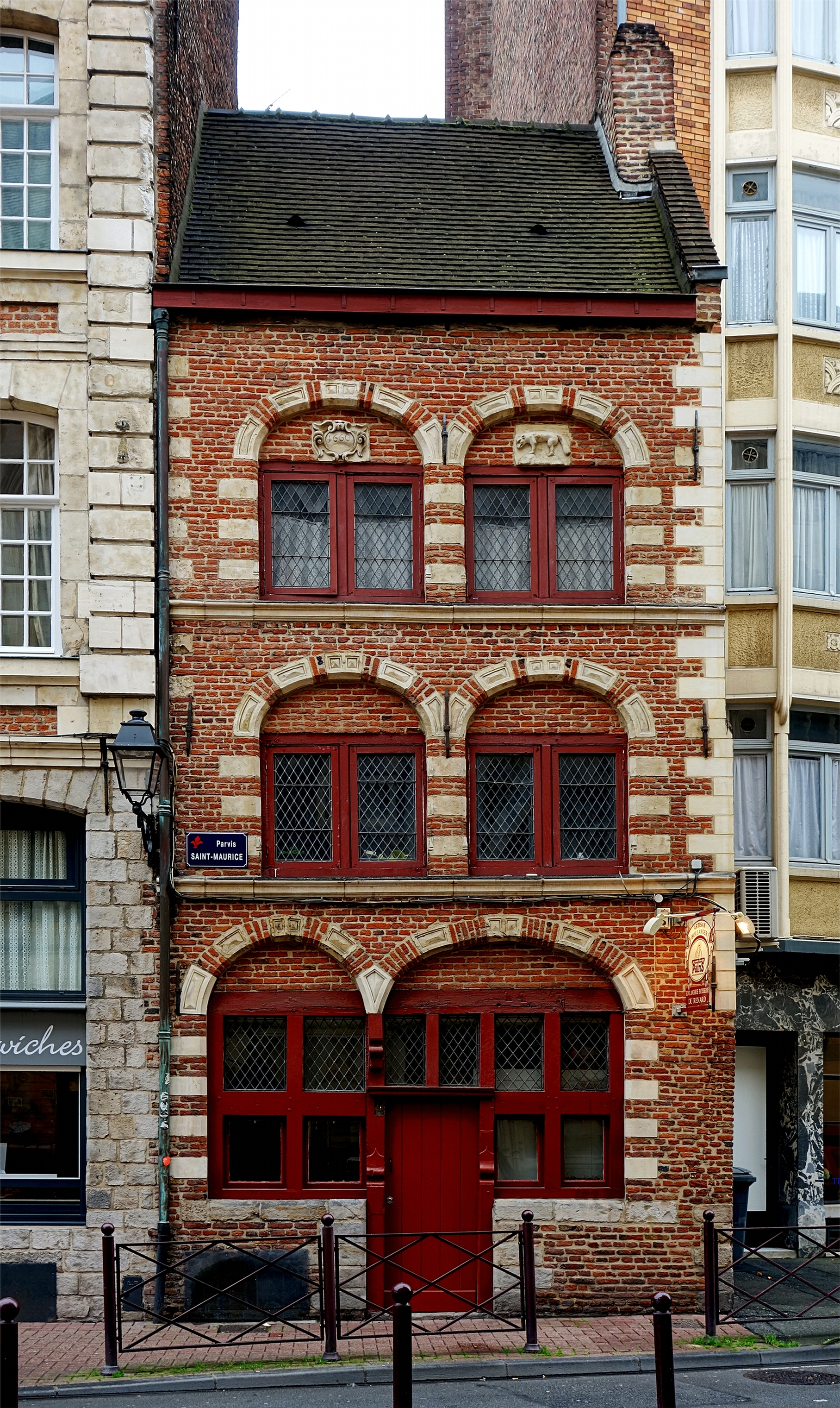 Immeuble (Inscrit) Parvis Saint Maurice à Lille. .